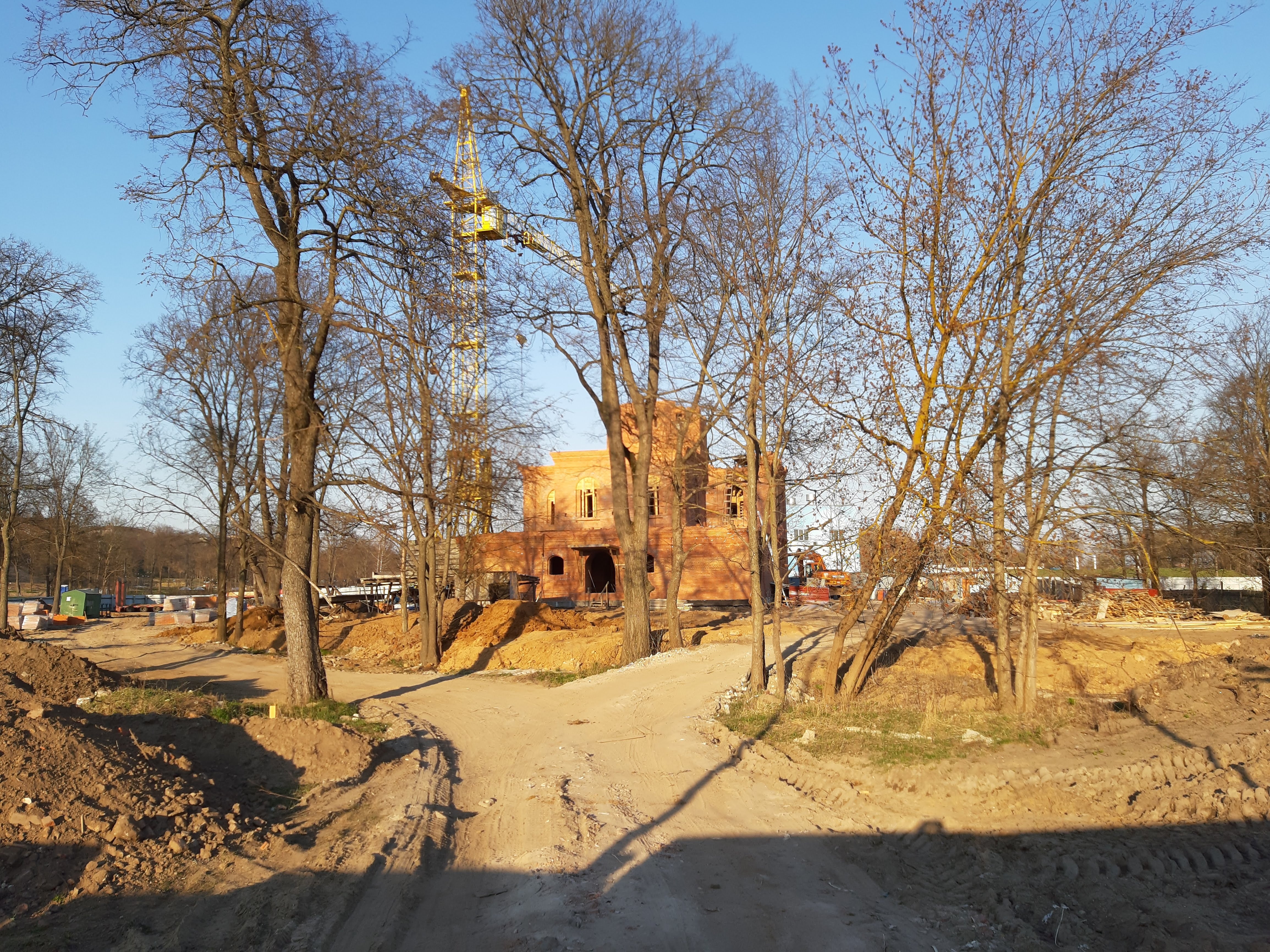 Магілёў. Аднаўленне Пакроўскай царквы